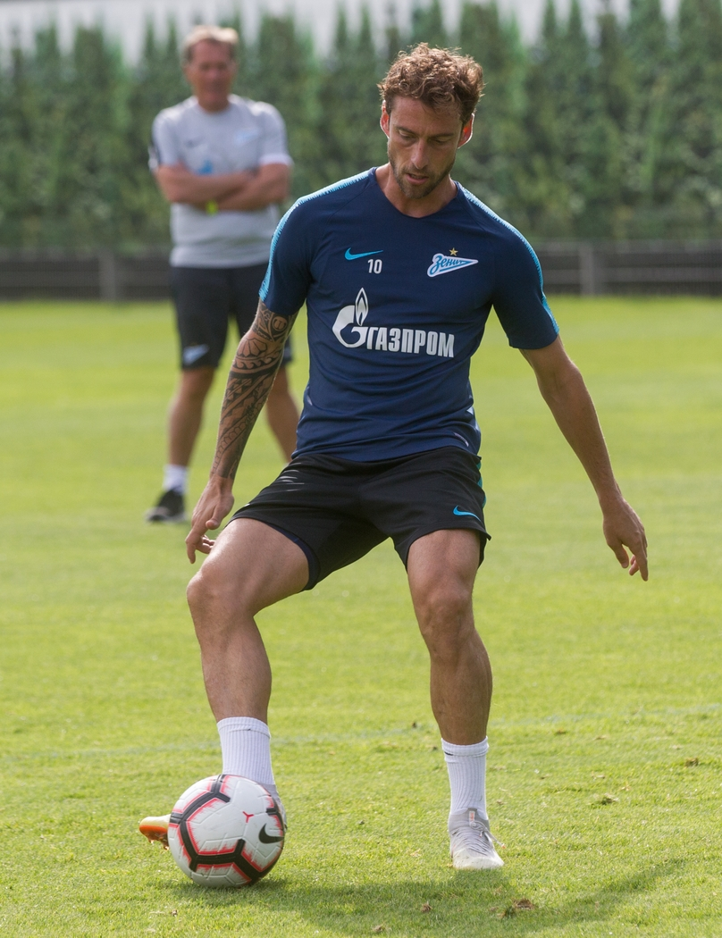 09.09.2018. Россия, Санкт-Петербург, «Газпром»-тренировочный центр. Первый день в Удельном парке Клаудио Маркизио, полузащитника ФК «Зенит».